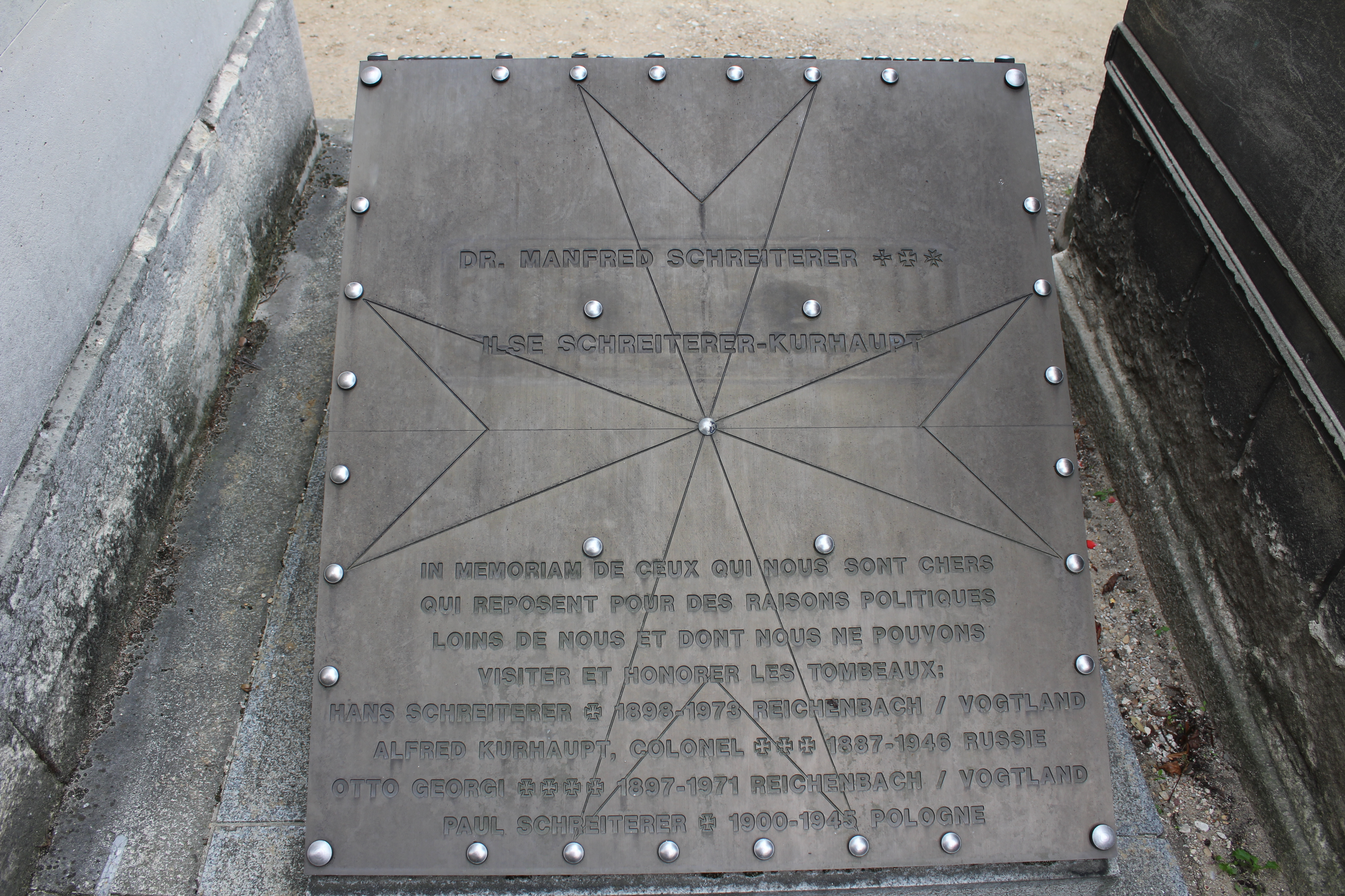 face avant